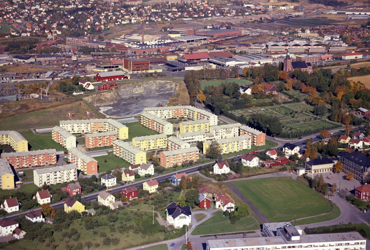 Strømsveien i front av boligblokkene i Karl Staafs vei og Østre Aker kirke, Ulvenveien til venstre for kirken. Skolen til høyre er idag Kriminalomsorgens utdanningssenter. Ulven gård bak boligblokkene.